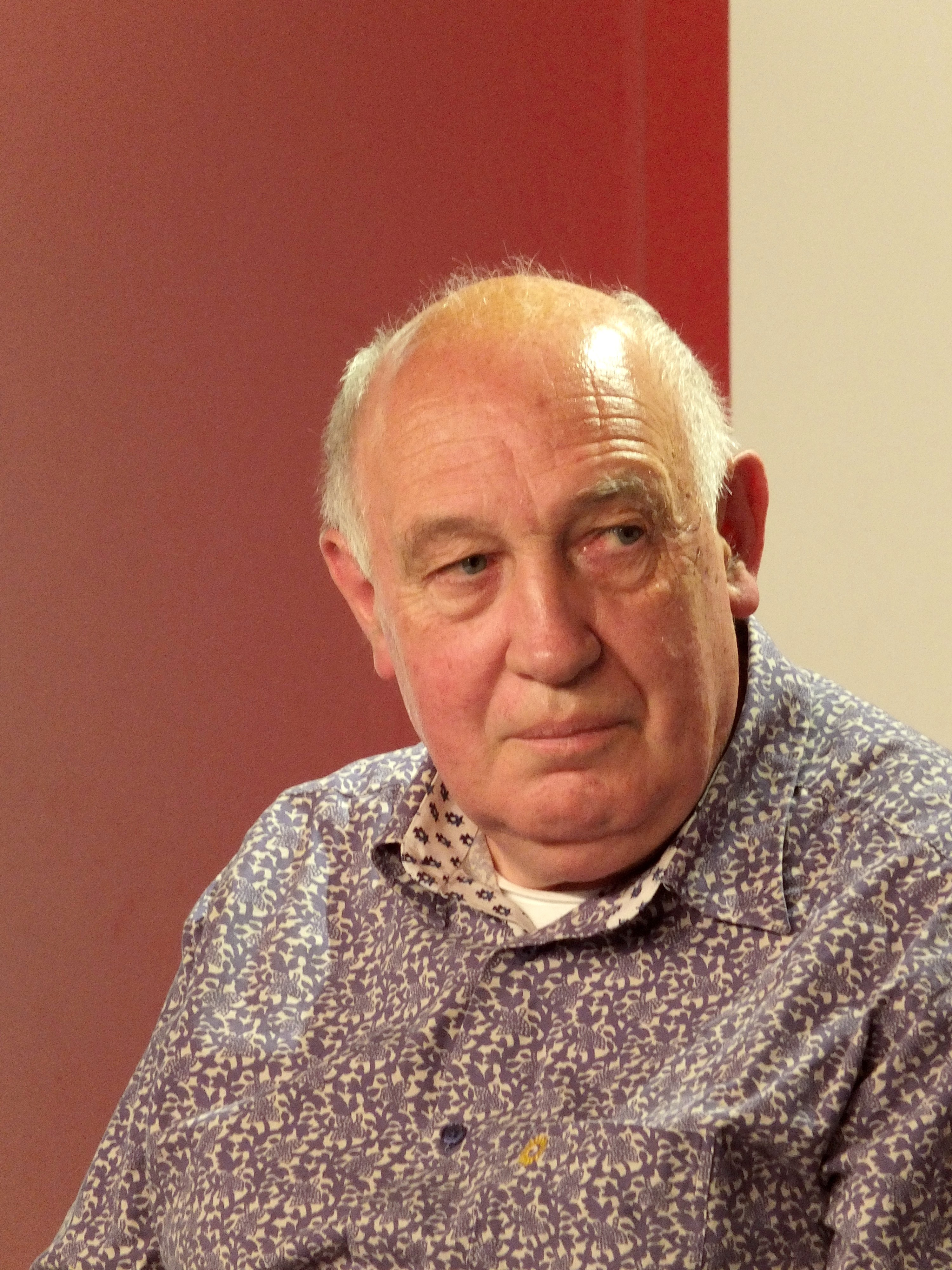 Raymond Depardon lors de la présentation de son film Journal de France, co-réalisé avec Claudine Nougaret, le 16 juin 2012 à la FNAC Montparnasse, Paris.